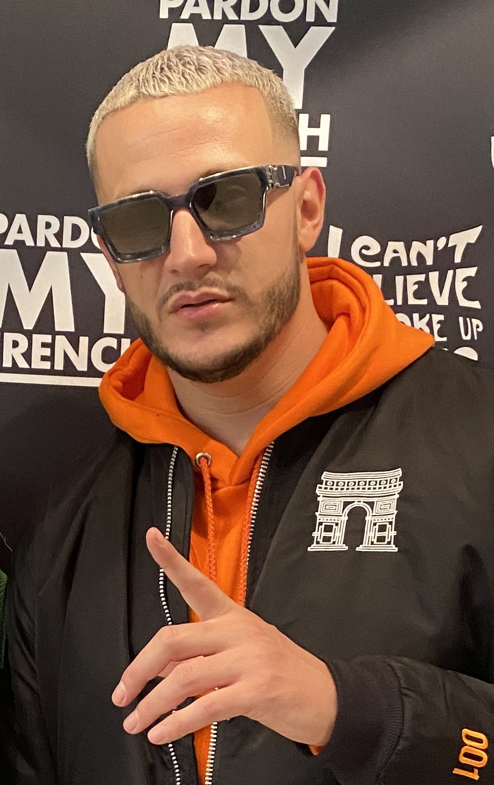 DJ Snake lors d'une rencontre avec ses fans dans la boutique de sa marque de vêtements Pardon My French, à Paris, le 21 février 2020.